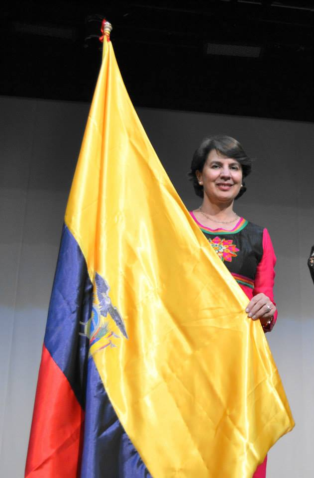 Rosalía Arteaga, ex-presidenta del Ecuador, abanderada del II Congreso Literario Internacional por la Identidad de los Pueblos y la Paz.